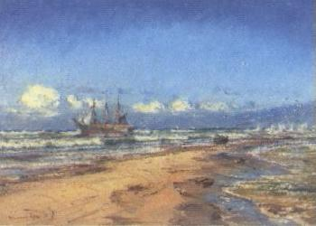 Mogens Ege Stranded at Skagen's point